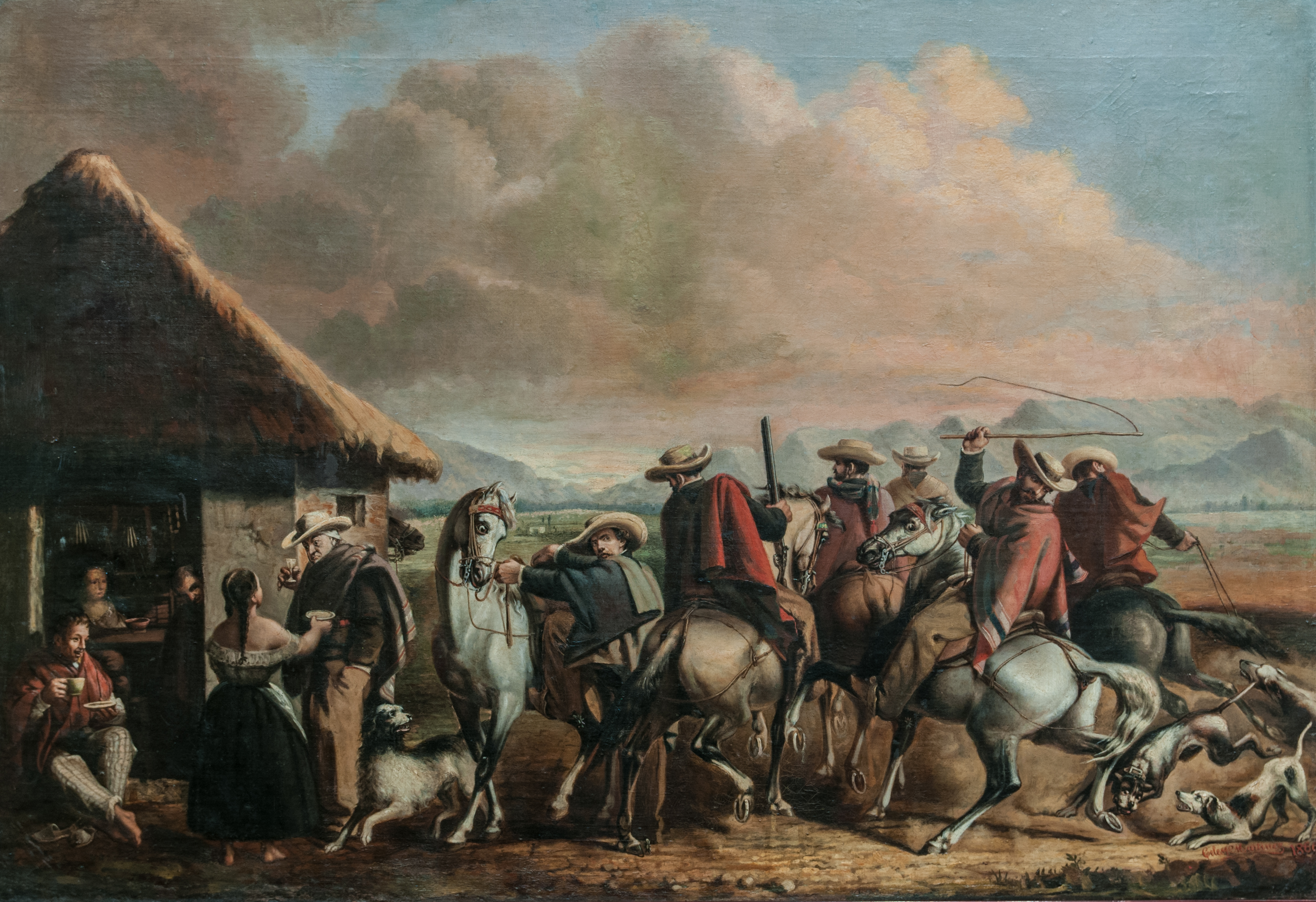 Los cazadores a caballo en la posada 1866. Oleo sobre tela. Galería de Arte Nacional, Caracas - Venezuela